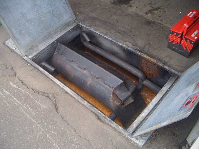 直熱式融雪機